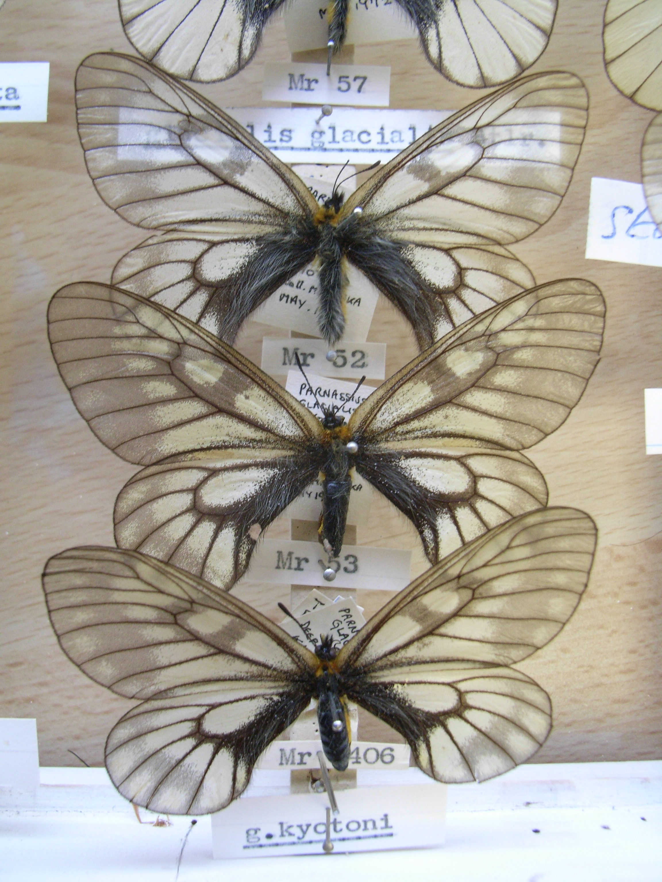 Parnassius glacialis kyotoni